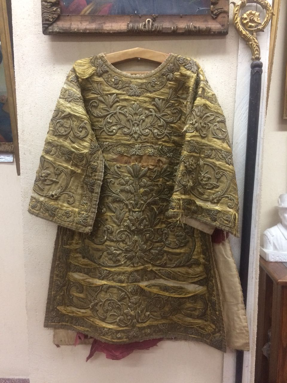 Casulla con hilos de oro y el báculo del presbítero paraguayo Fidel Maíz (Museo Militar del Paraguay)